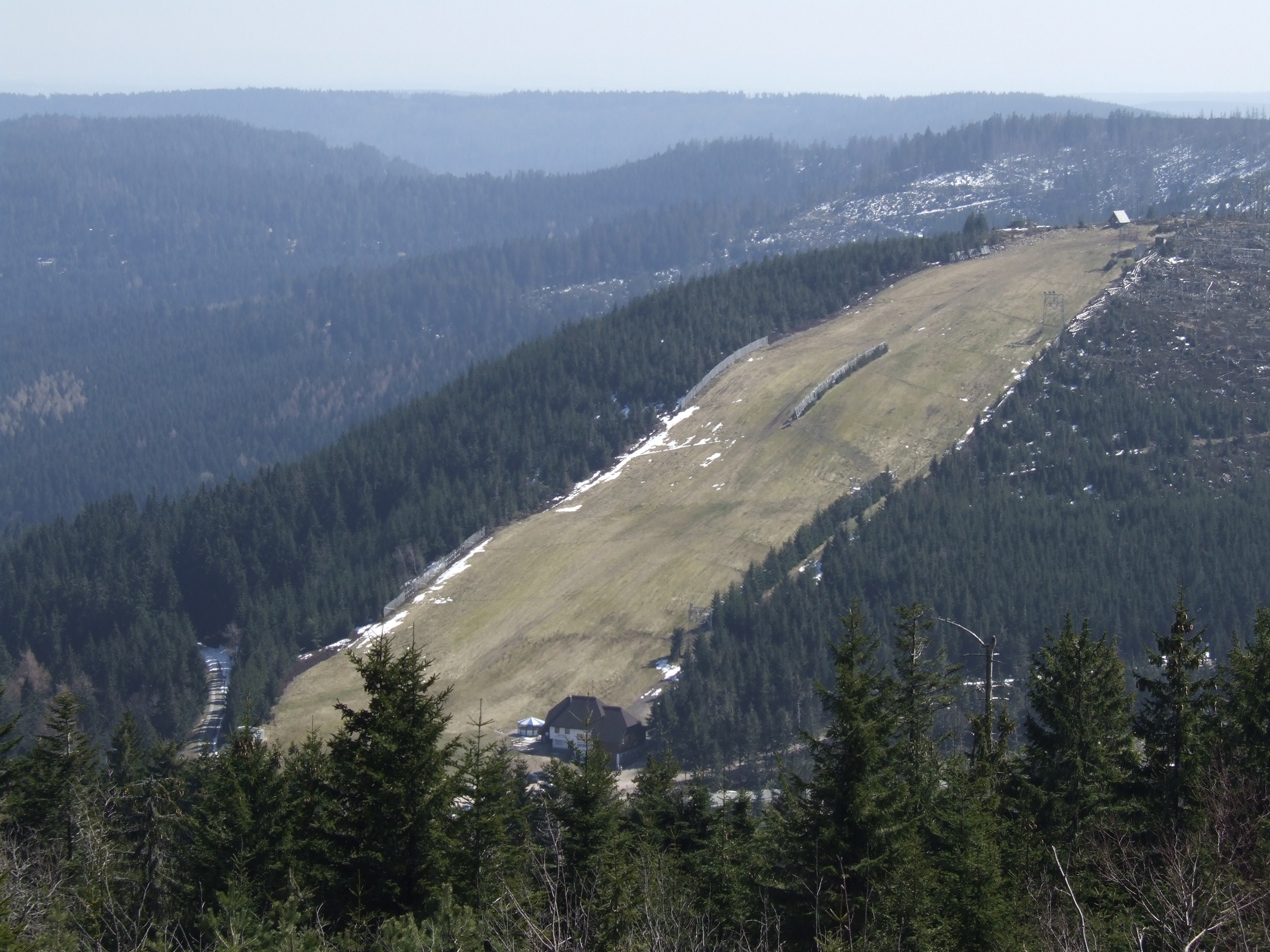 Der Skihang Seibelseckle im nördlichen Schwarzwald